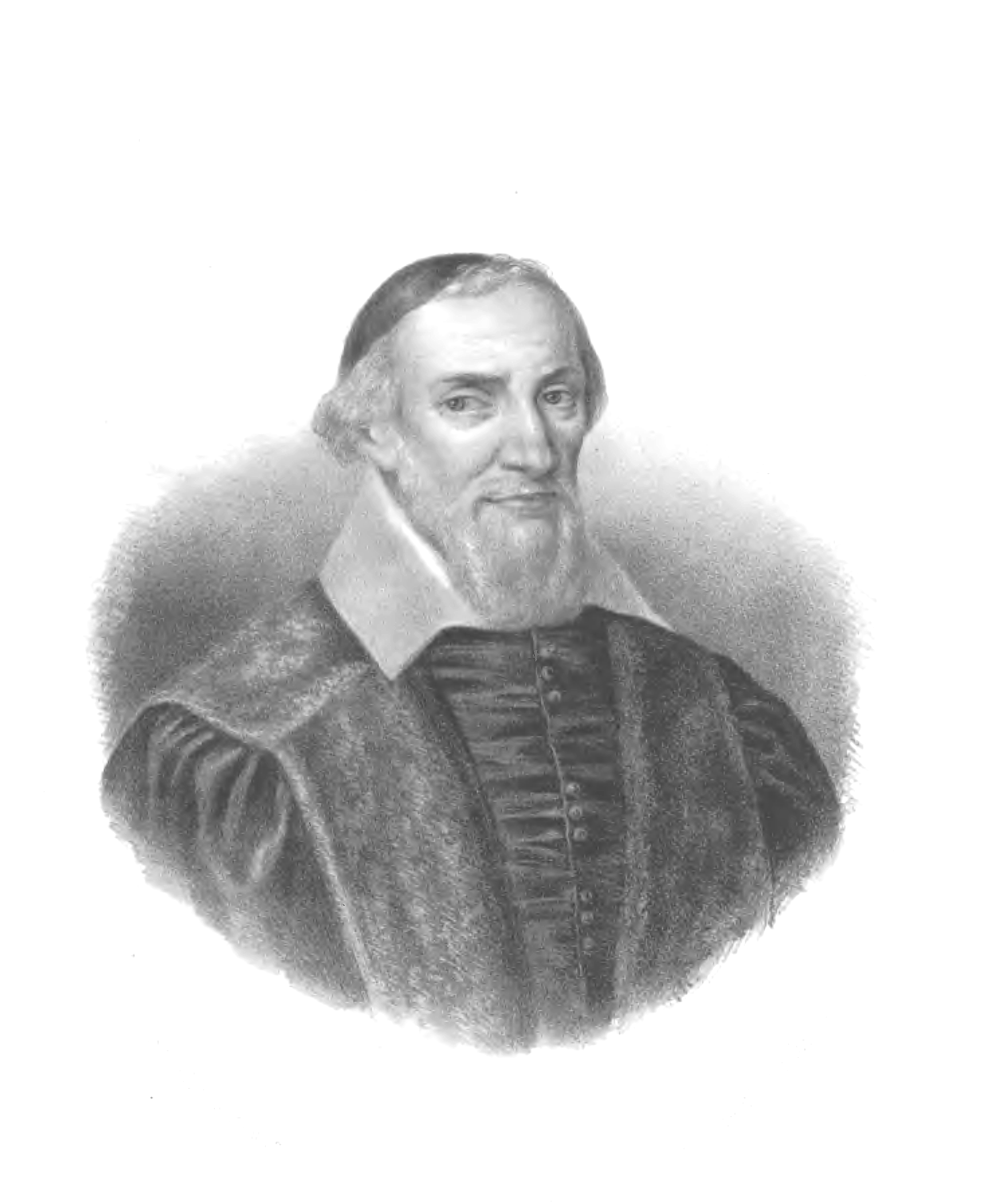 Mikołaj Kurowski, archbishop of Gniezno